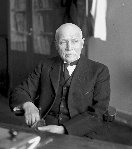 Портретна снимка на Карол Бохданович, полски и руски геолог и изследовател.